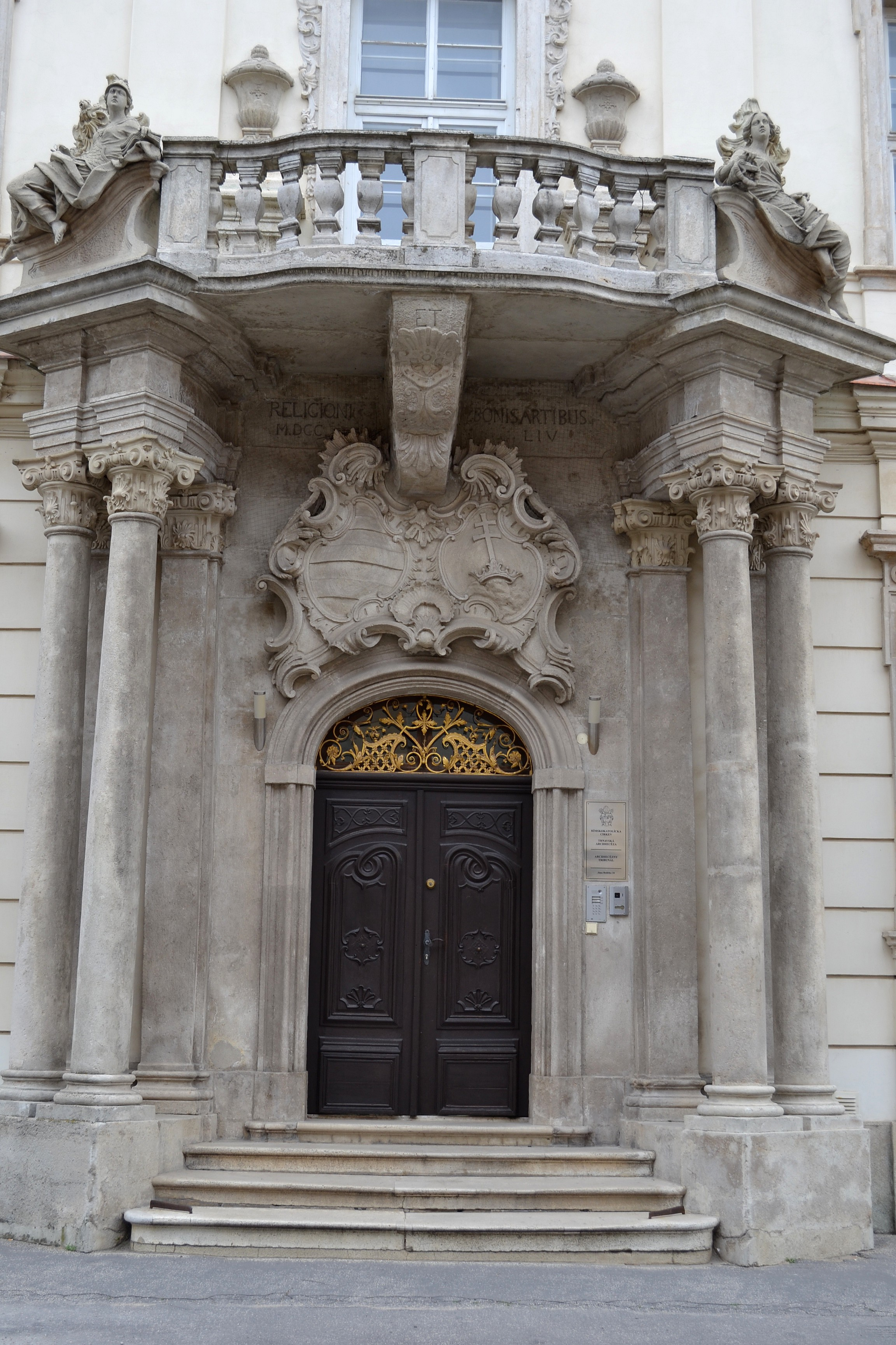 Trnava, komplex univerzitných budov; budova Šľachtického konviktu; portál budovy